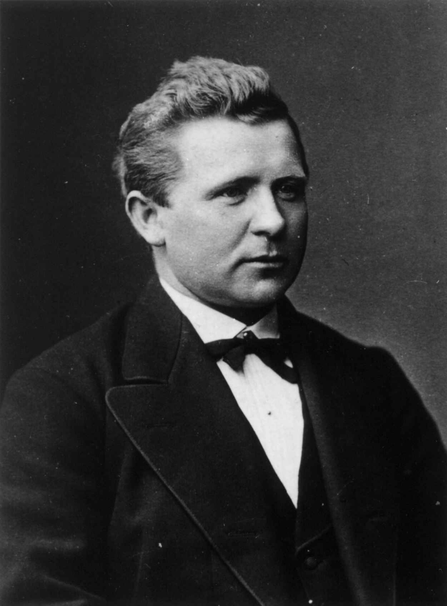 Den norske politikeren og finansministeren Ole Furu (1841-1925)